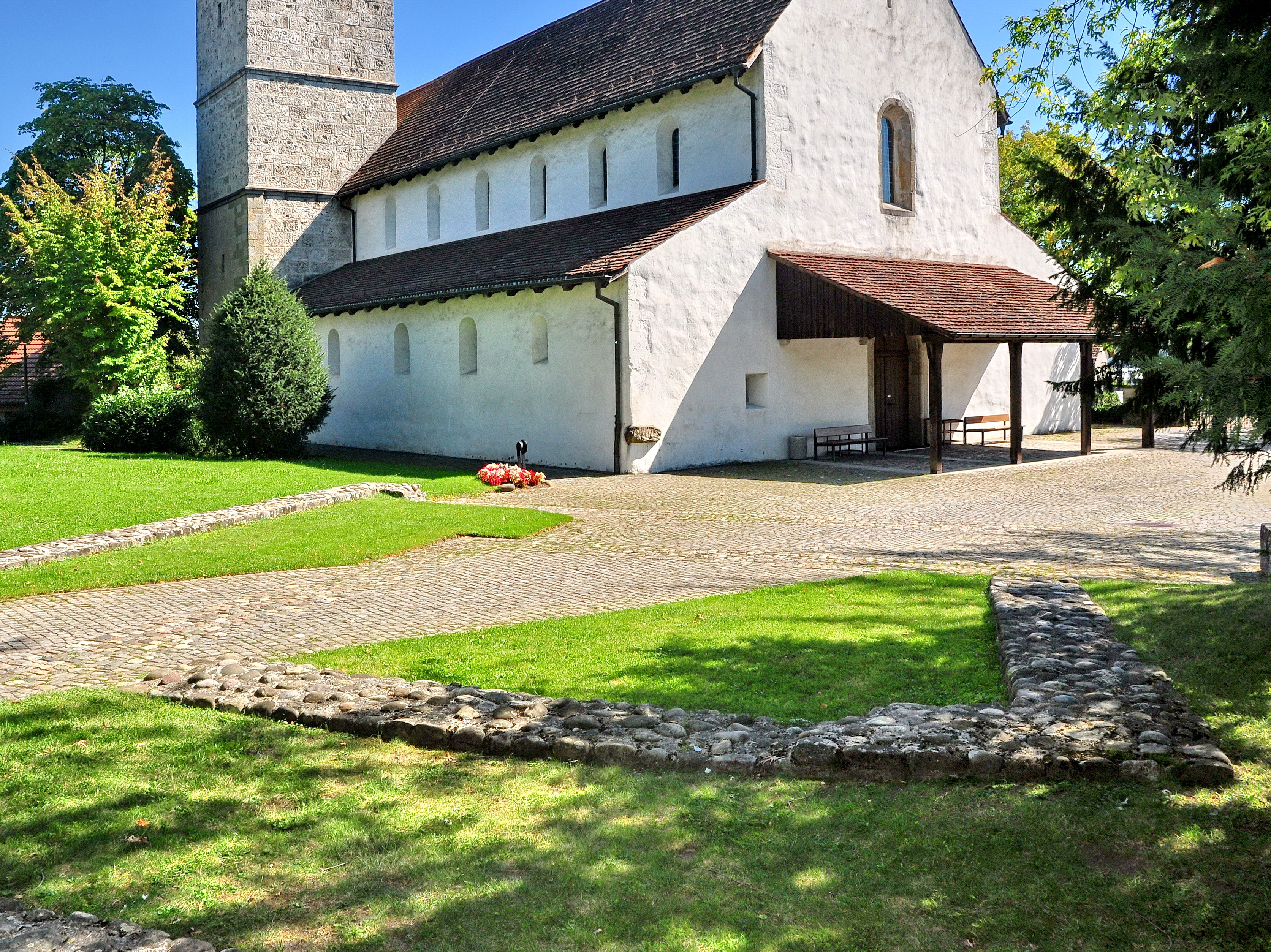 Vitudurum / Oberwinterthur, römischer Vicus, Reformierte Kirche St. Arbogast, Obere Hohlgasse in Winterthur (Switzerland)